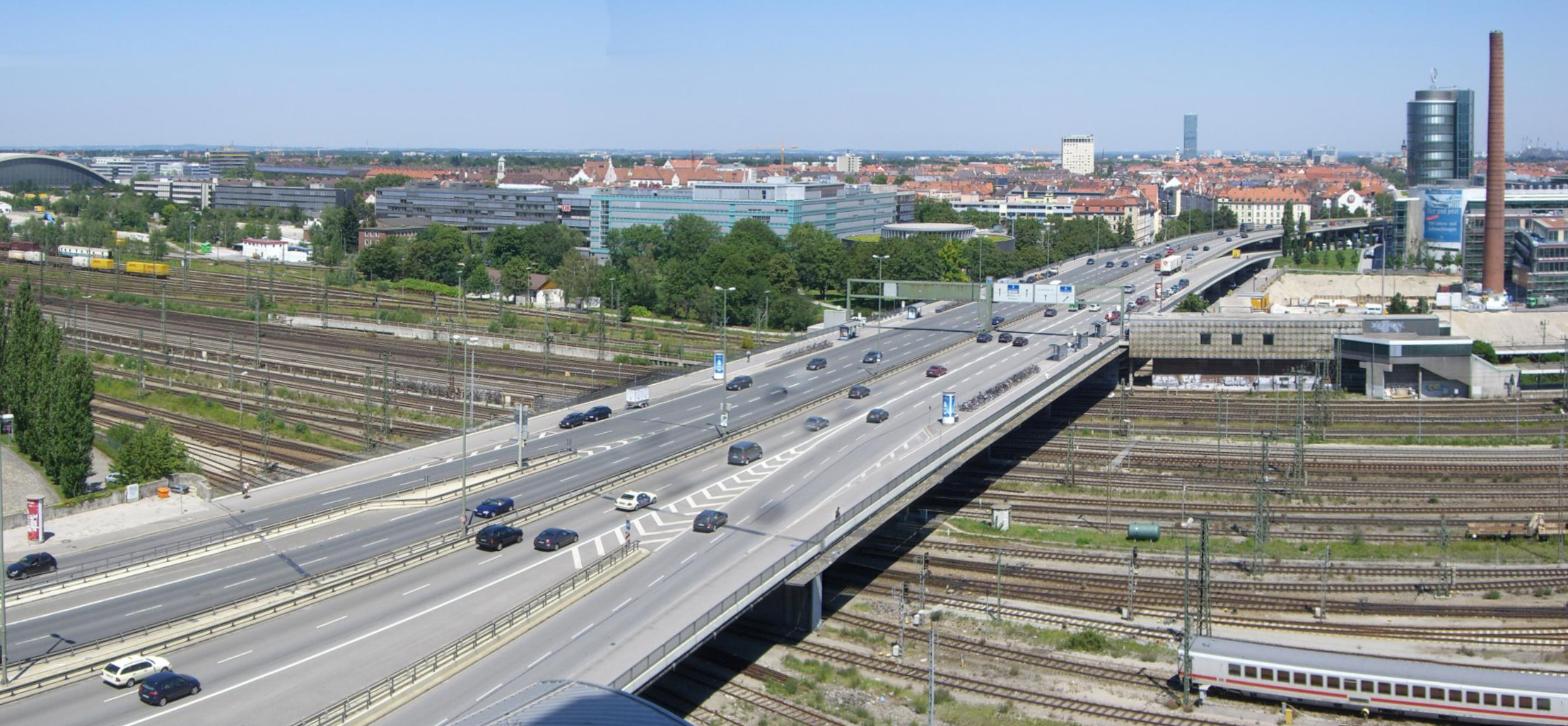 München - Donnersbergerbrücke (Panorama)